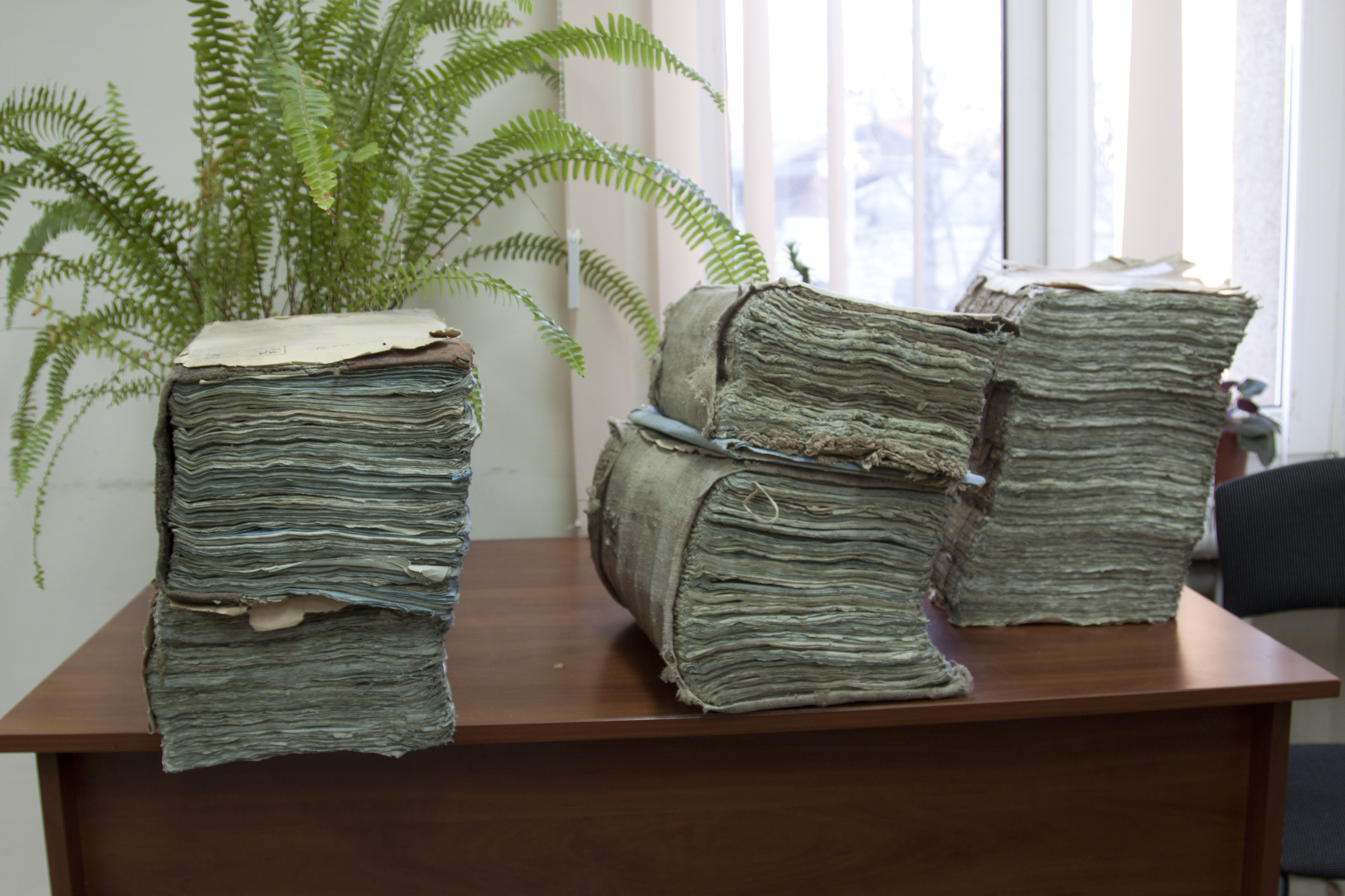 Метричні книги Севастянівка